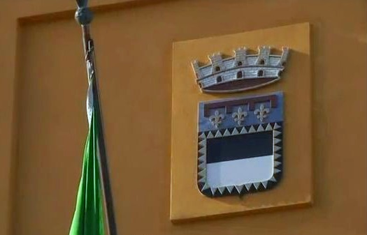 Stemma del Comune di Cesena